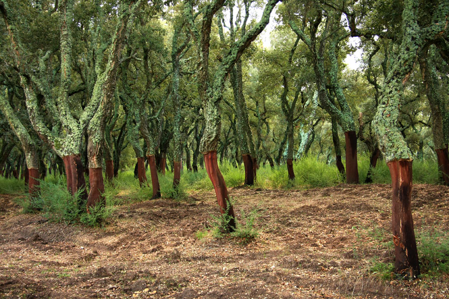 Bosco di querce da sughero dopo l'estrazione nei pressi di Tempio Pausania, Sardegna.